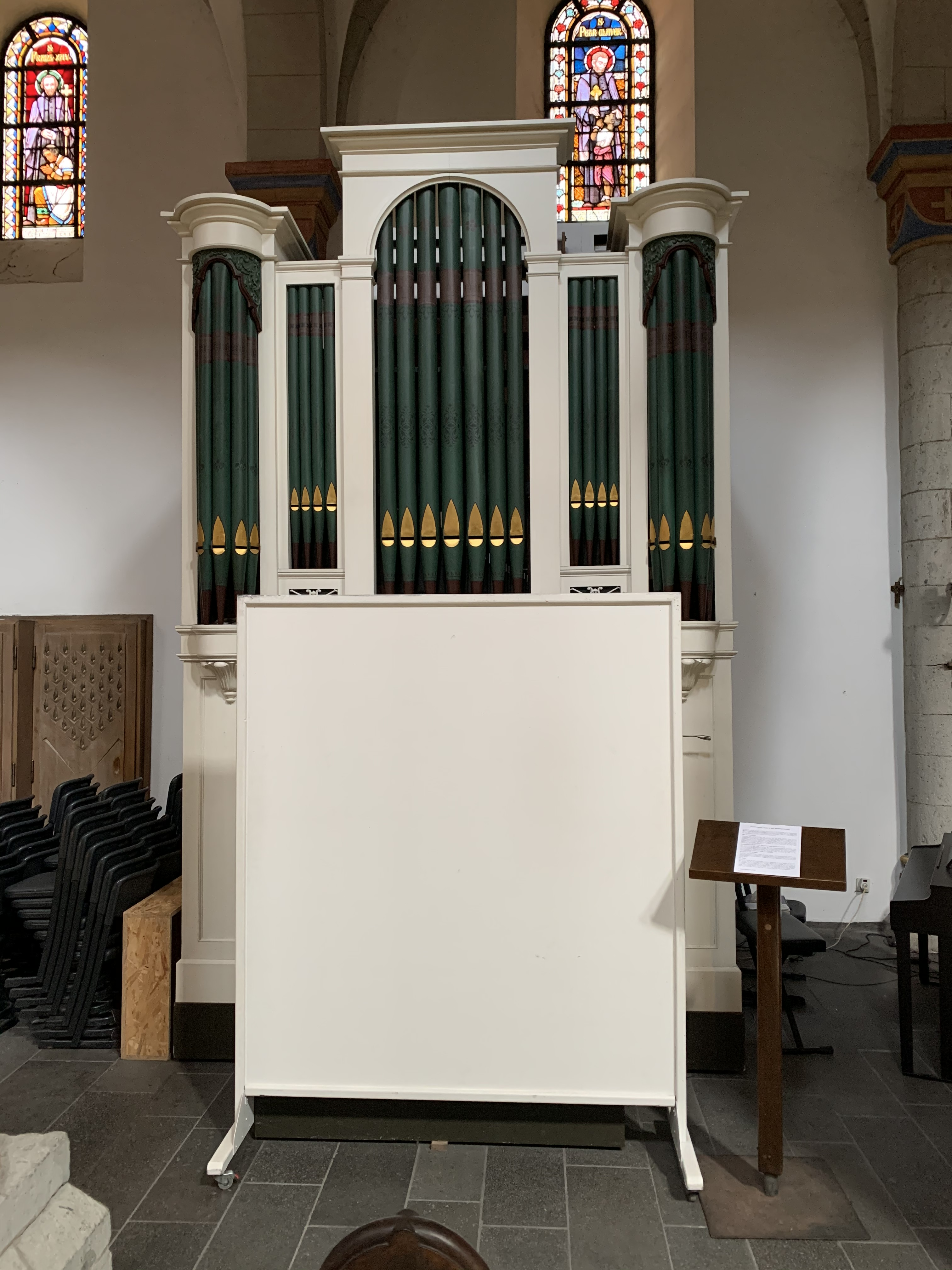 Die William-Holt-Orgel in der Basilika Knechtsteden